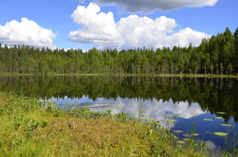 Reflejo de arboles y nubes en el agua.